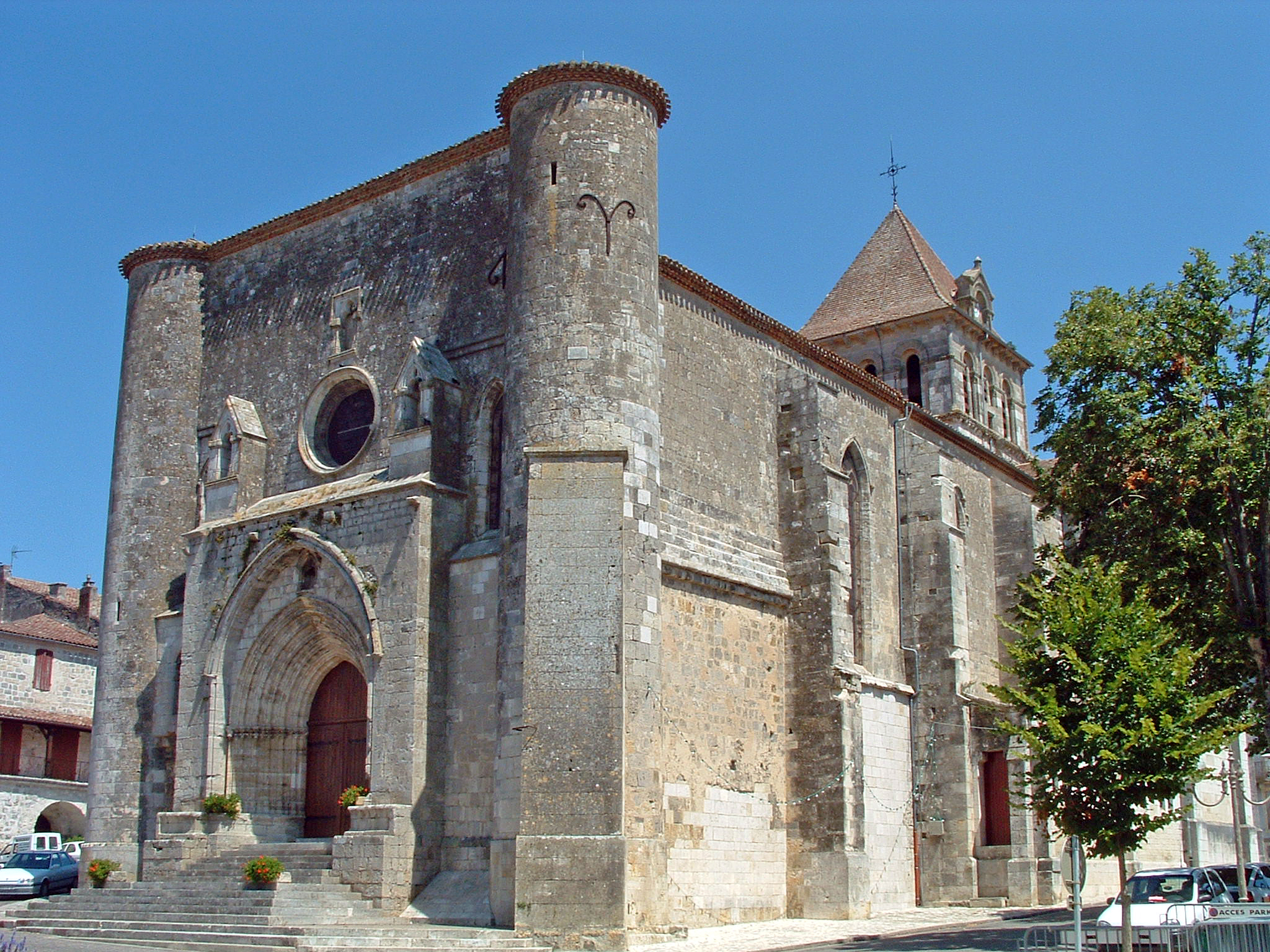 Mézin - Eglise Saint-Jean-Baptiste - Façade occidentale